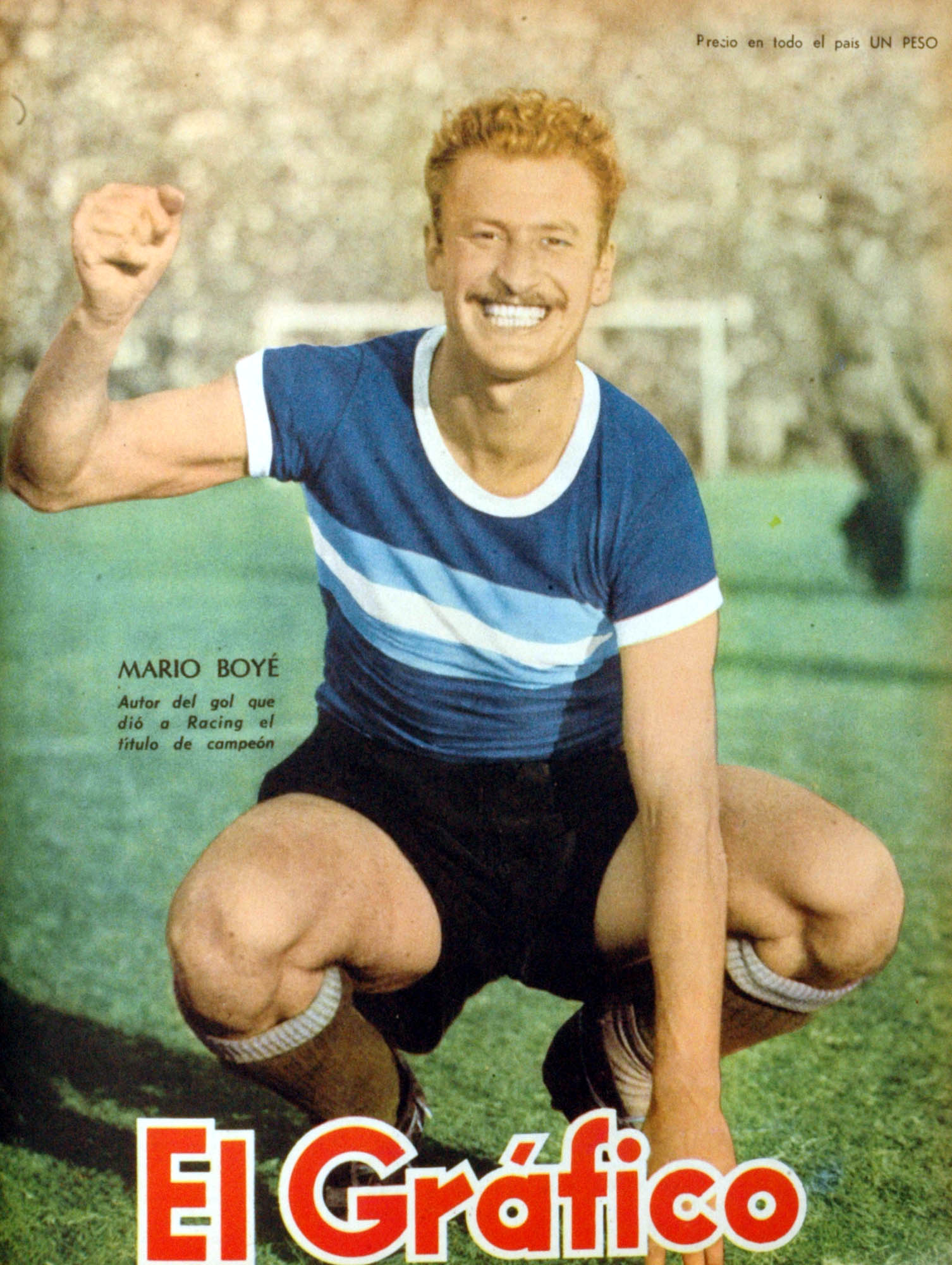 El Grafico del 28 de Diciembre de 1951. Edicion 1690